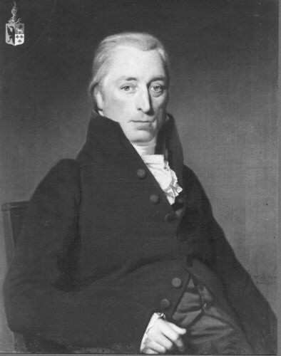 Fan Foto Argyf/Tresoar. 1821